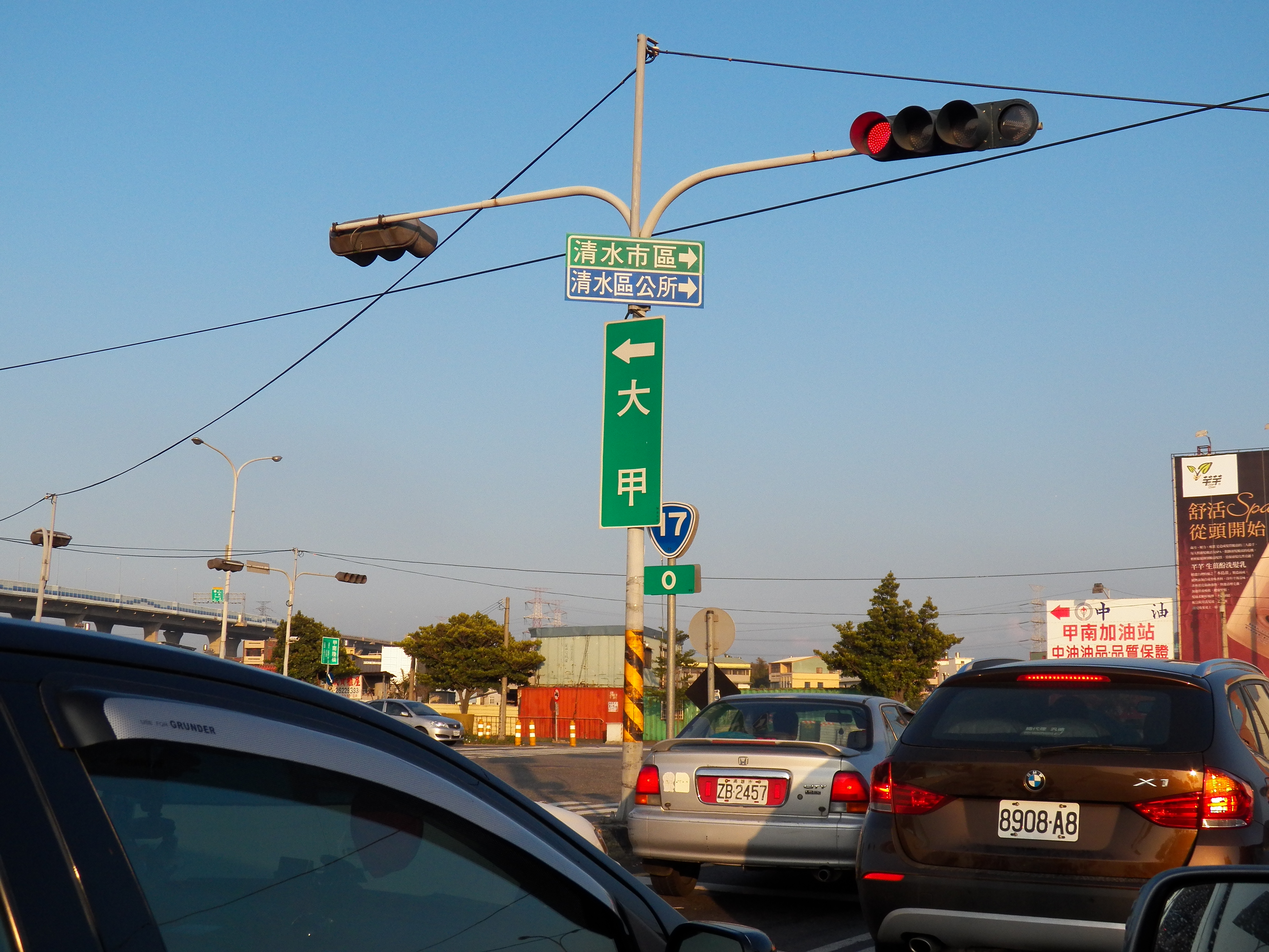 臺中市清水區省道臺17線起點。